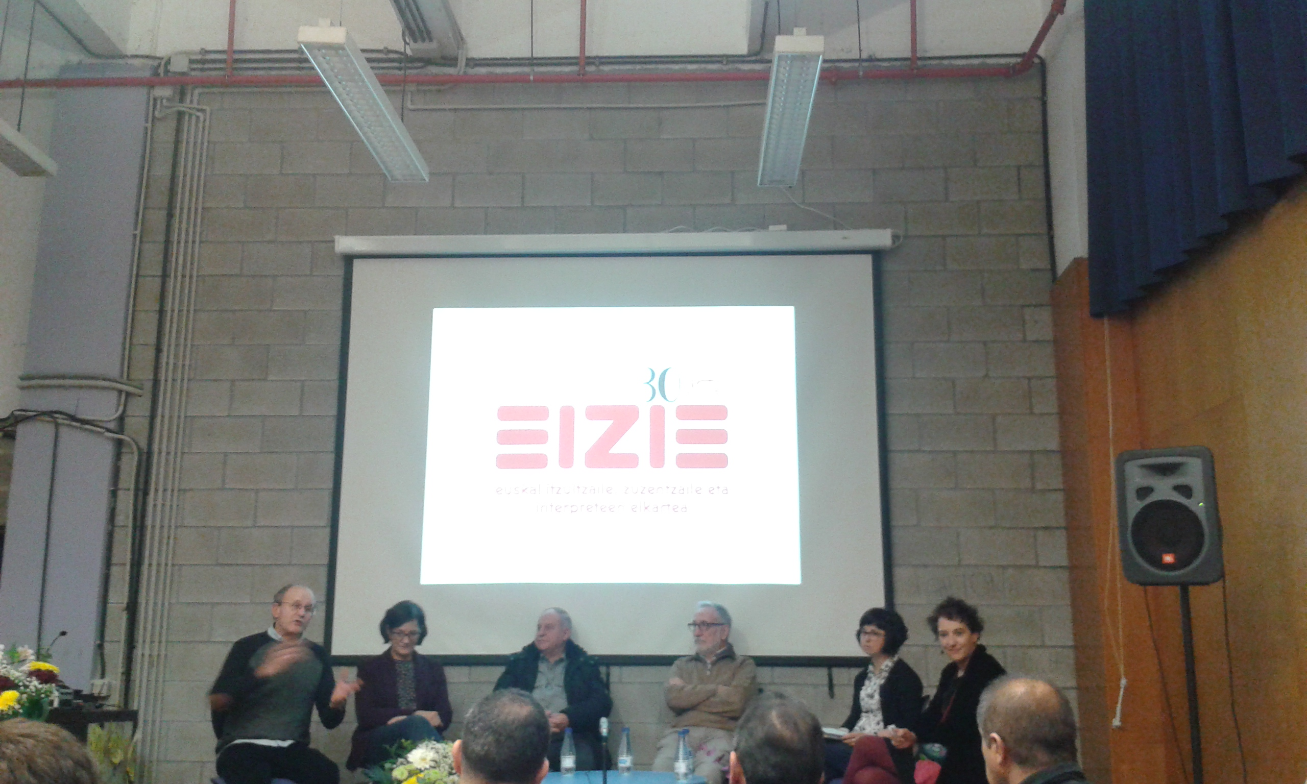 EIZIEren 30. urteurrena ospatzeko ekitaldia (Egia, Donostia)